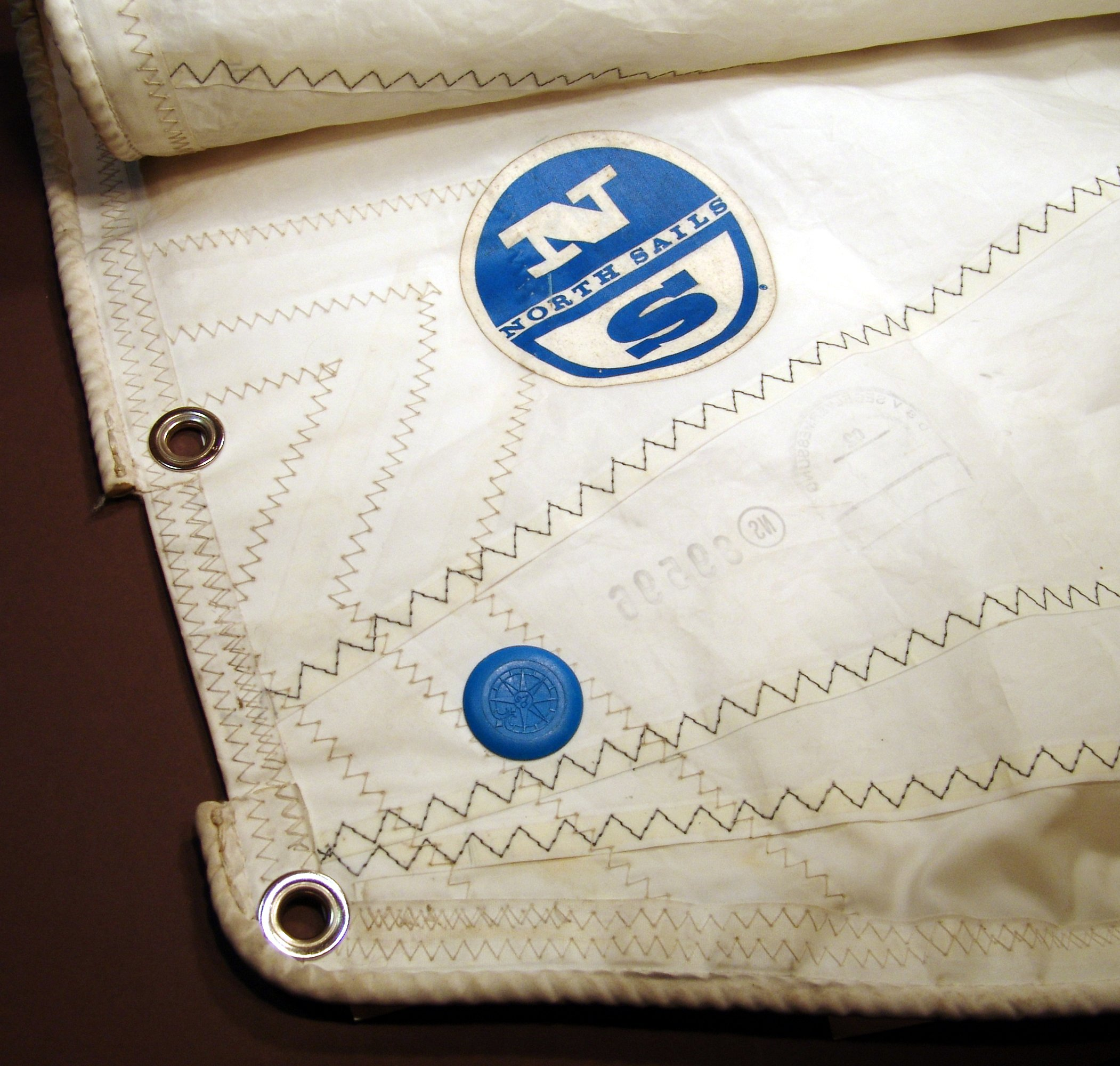 Hals eines Großsegels mit Cunningham-Kausch und eingenähtem Liektau an Vor- u. Unterliek, (Meßmarke, Stempel des DSV ist auch noch drauf)